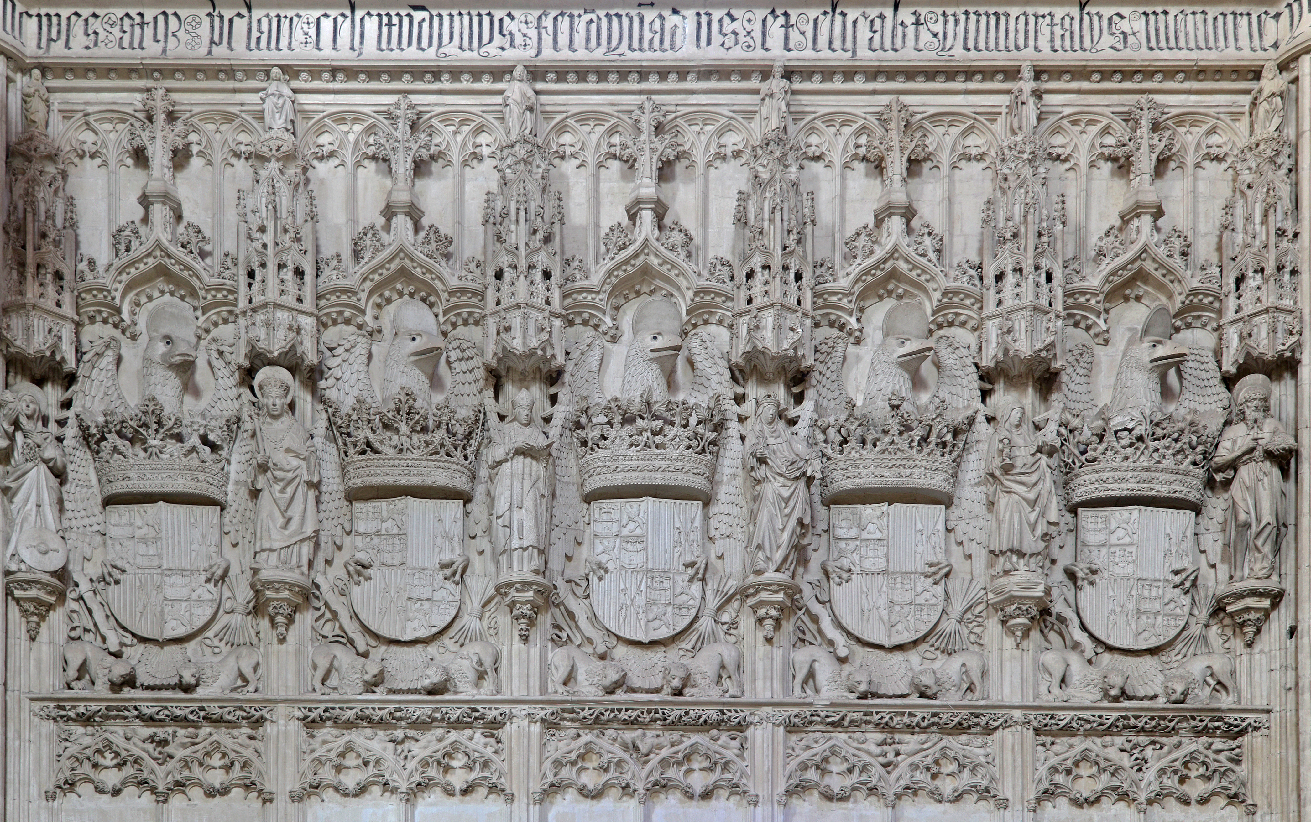 Monasterio de San Juan de los Reyes - Toledo